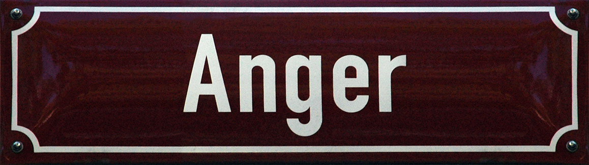 Straßenschild Anger